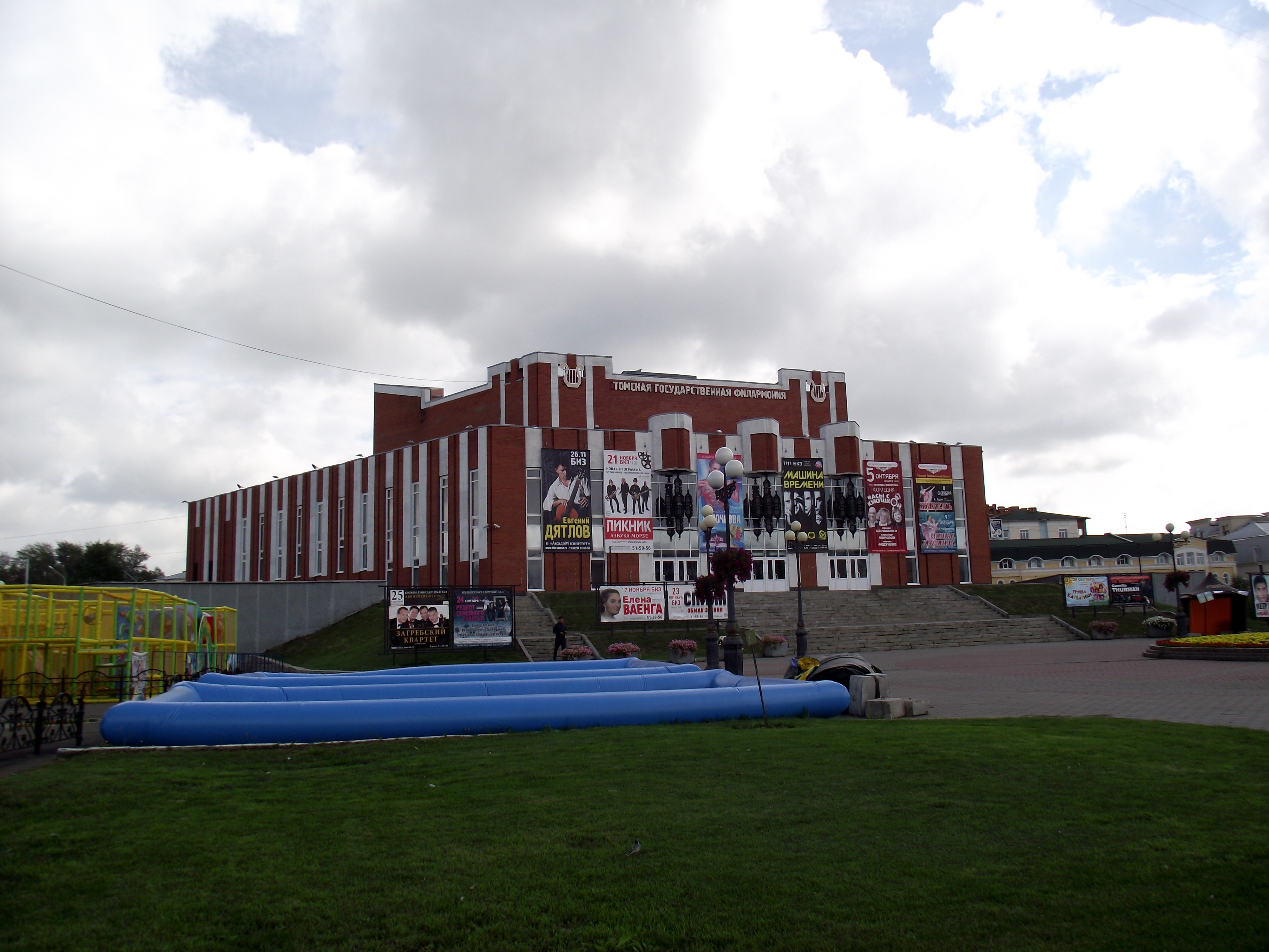 Вид с проспекта Ленина.